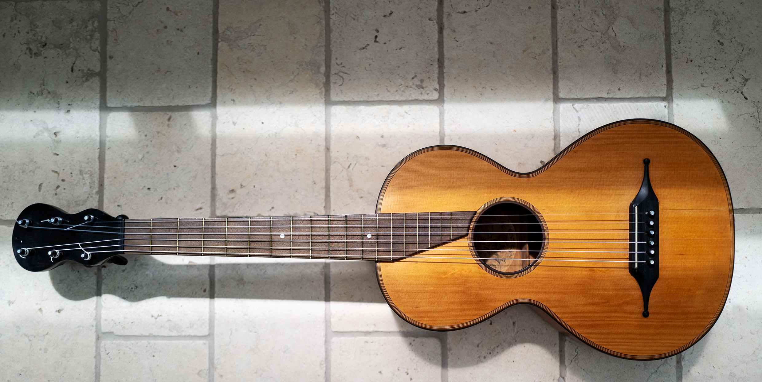 Max Amberger Gitarre von 1875 Foto: Stiftungsarchiv Hermann Hauser Guitar Foundation, HHGF2020